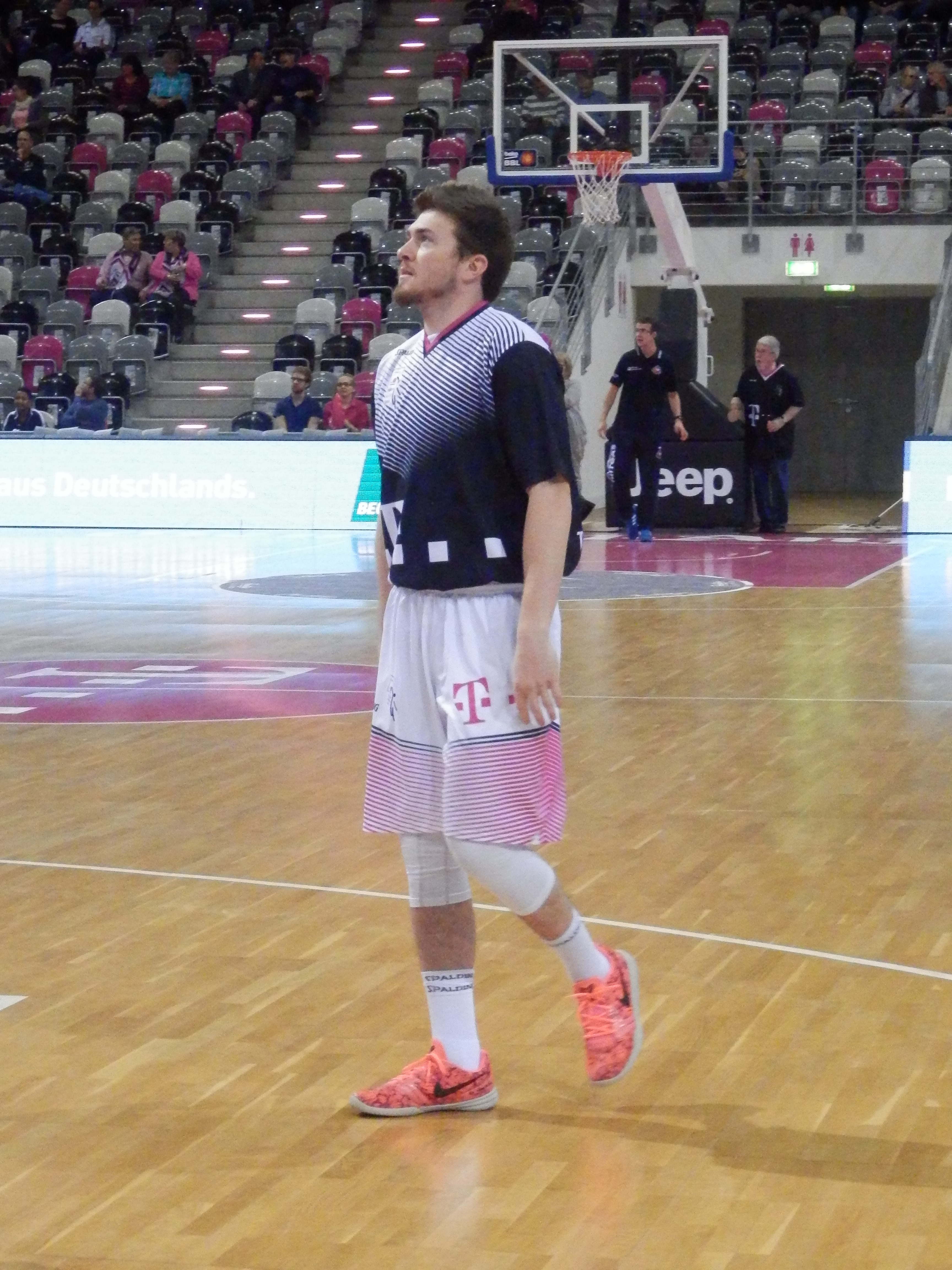 Rotnei Clarke beim Spiel der Telekom Baskets Bonn gegen den MBC am 7. Oktober 2015.